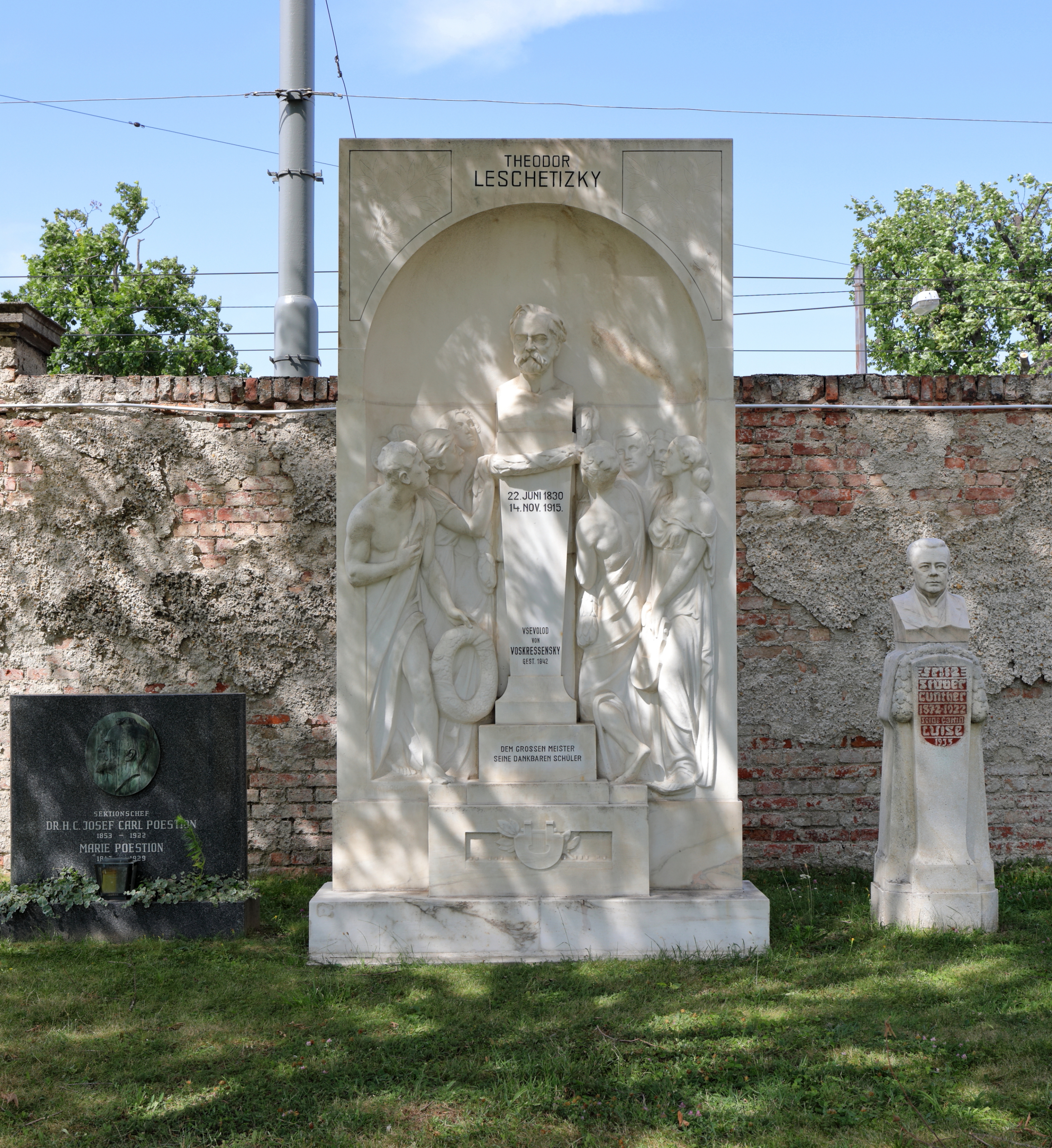 Das Grabmal des Komponisten Theodor Leschetizky am Wiener Zentralfriedhof im 11. Wiener Gemeindebezirk Simmering (Gruppe 0, Reihe 1, Nummer 94) und links das Ehrengrab von Josef Poestion sowie rechts das von Fritz Stüber-Gunther. Leschetizky starb am 14.11.1915, am 10.12.1922 wurde er am Zentralfriedhof beigesetzt und 1926 schuf der Bildhauer Friedrich Zerritsch den Grabstein.